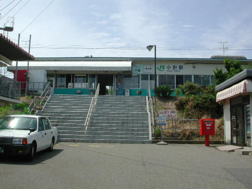 JR小針駅南口